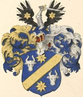 Ruckteschelli suguvõsa aadlivapp